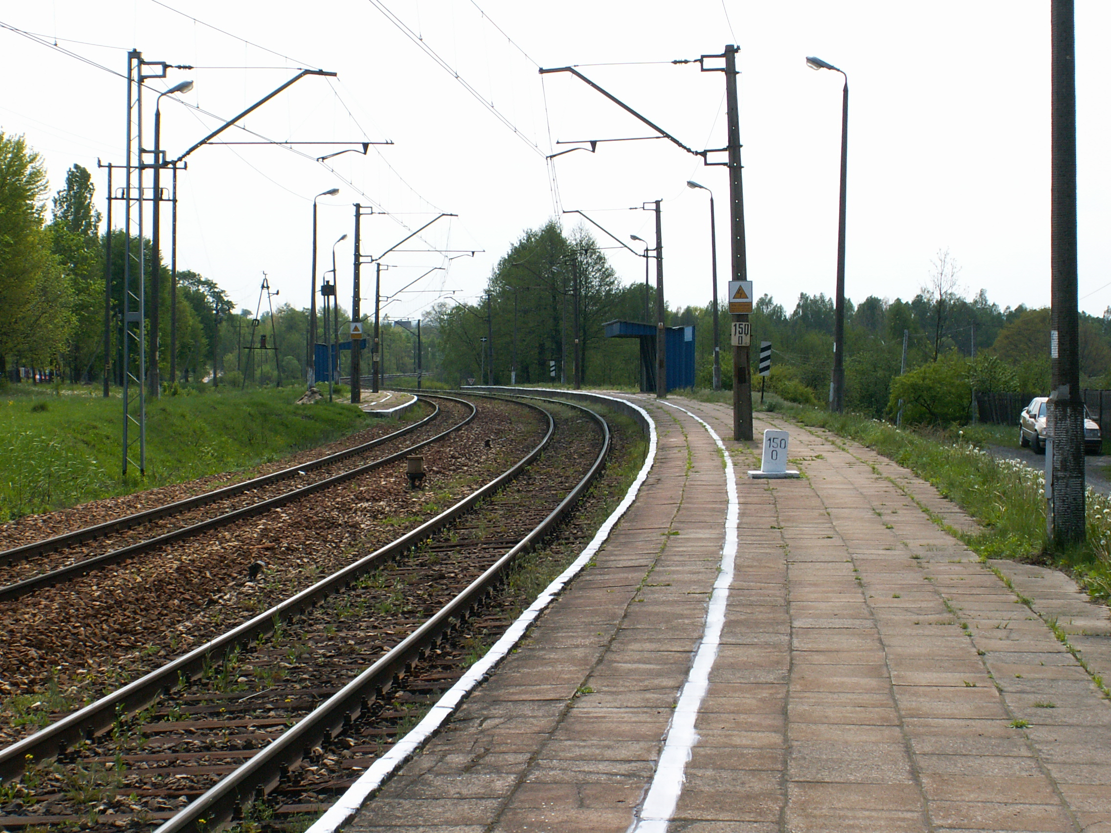 Suchedniów Północny - stacja PKP